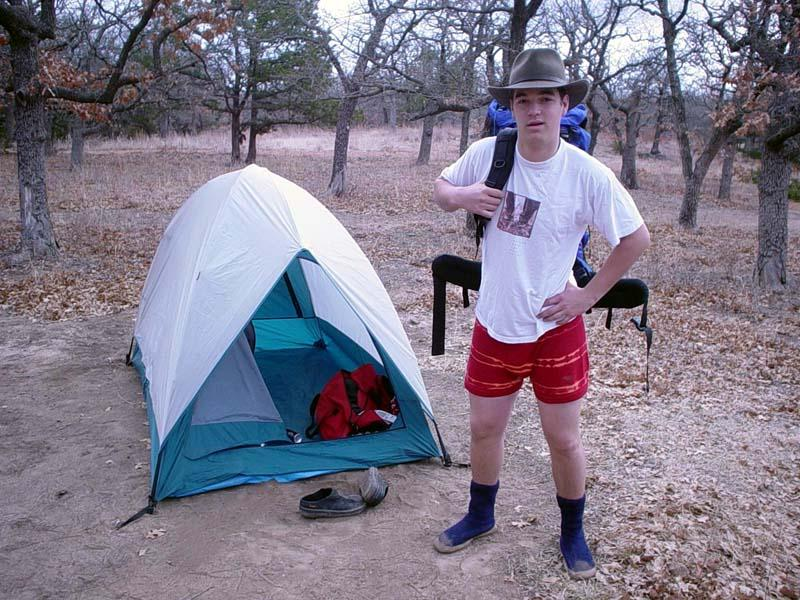 Camping in Oklahoma, USA